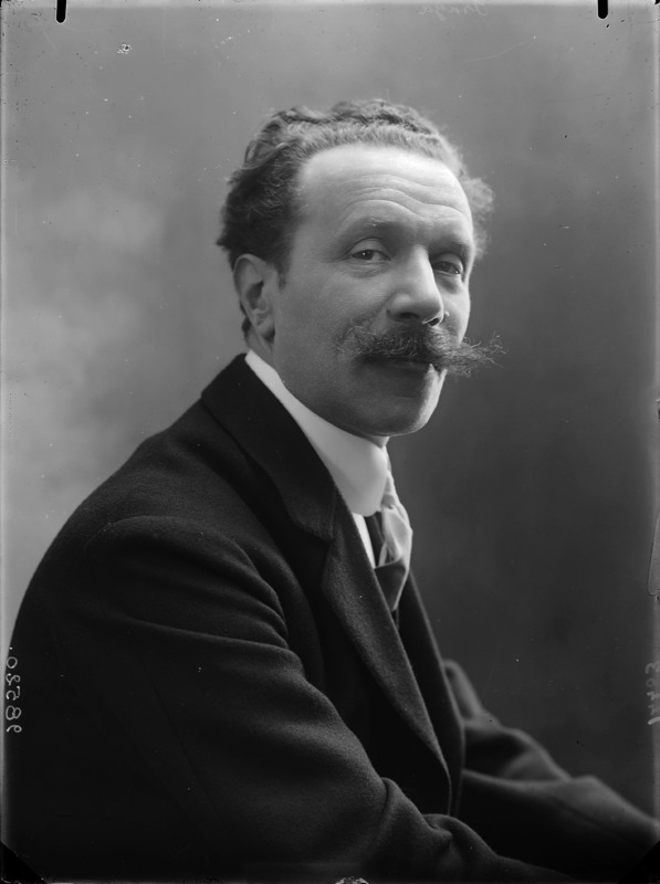 Marco Praga fotografato da Mario Nunes Vais